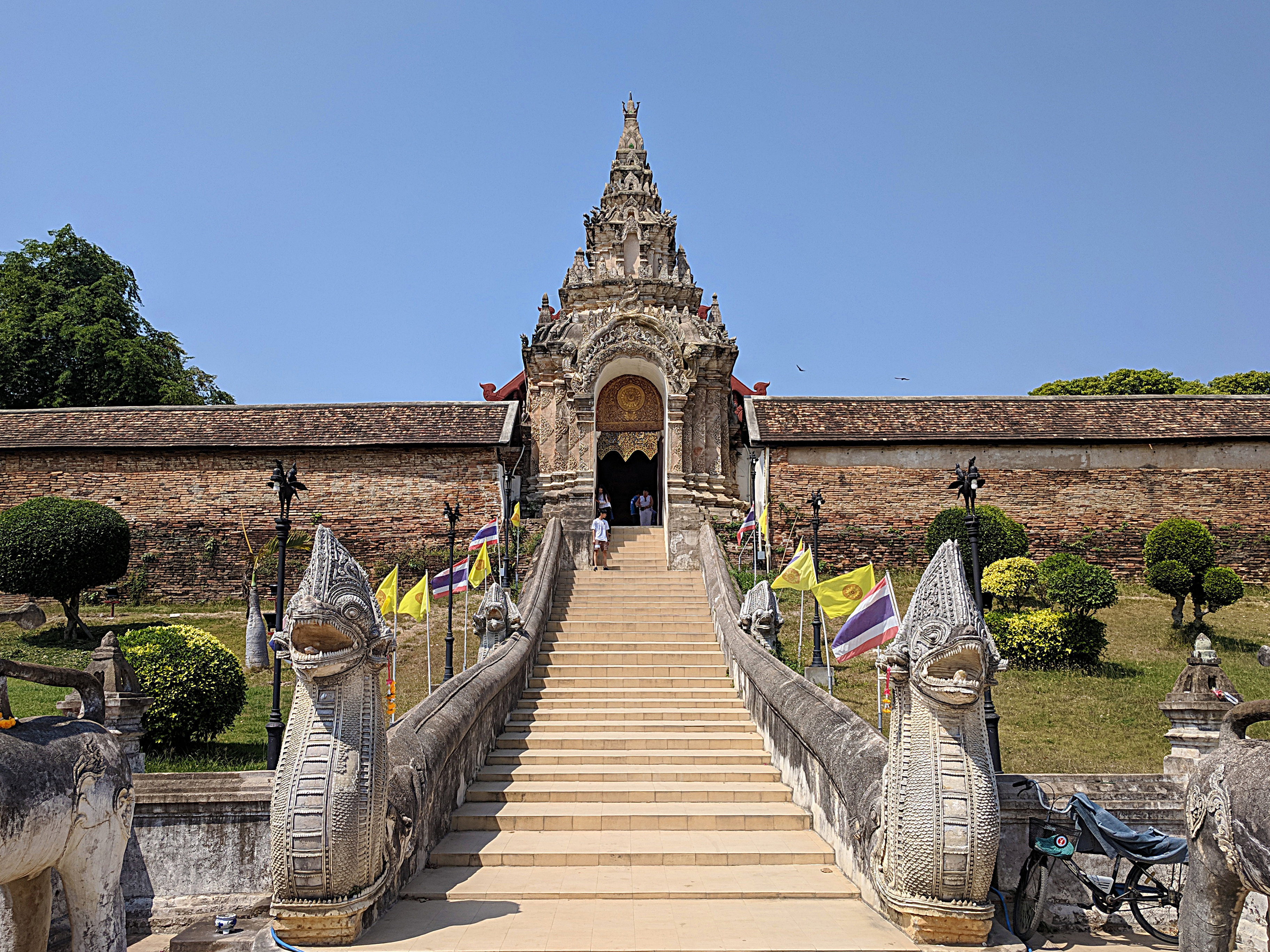 monumentales Hauptportal mit Naga-Treppe am Wat Phrathat Lampang Luang